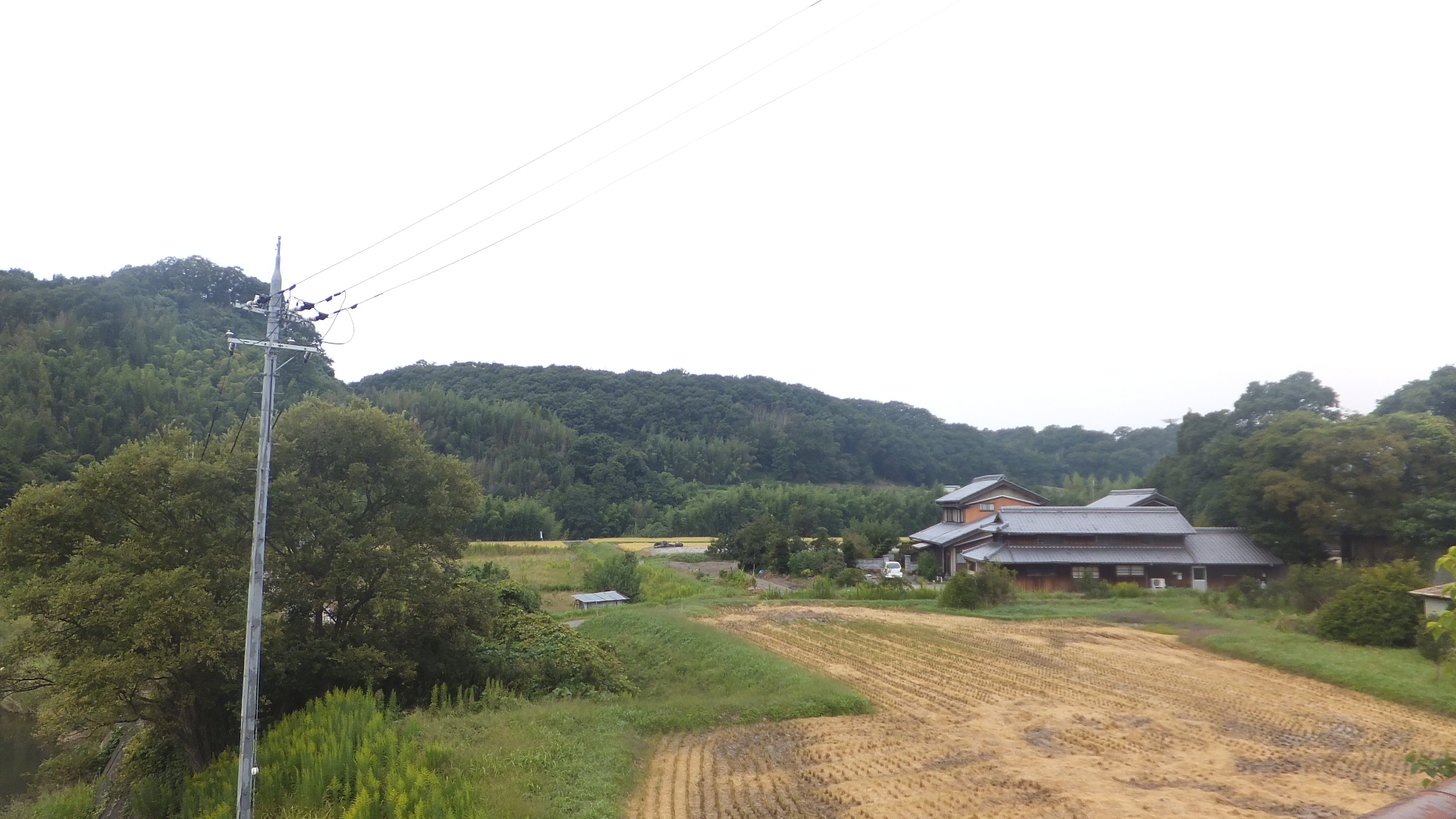 兵庫県三木市志染町三津田